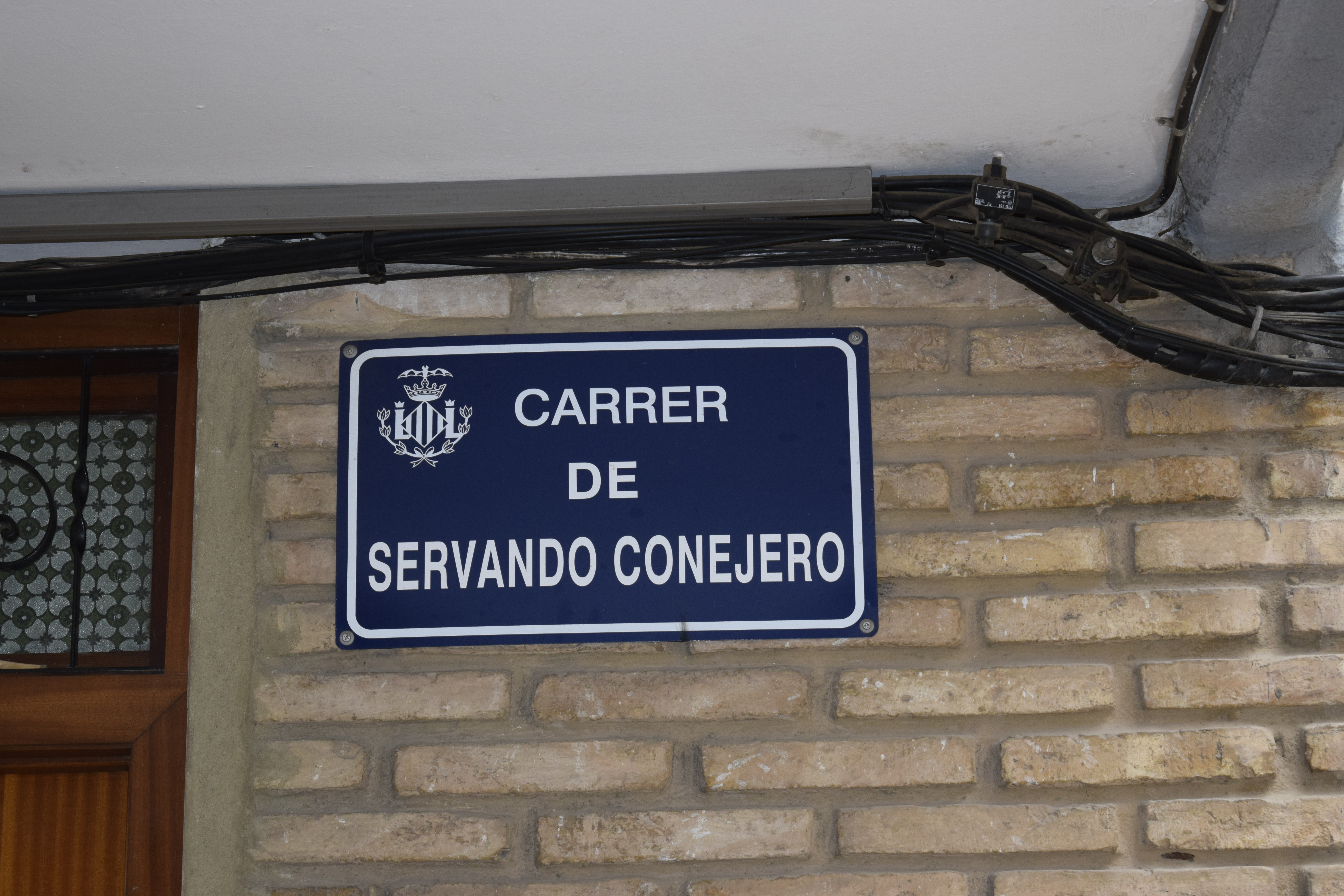 Calle de Servando Conejero, mártir